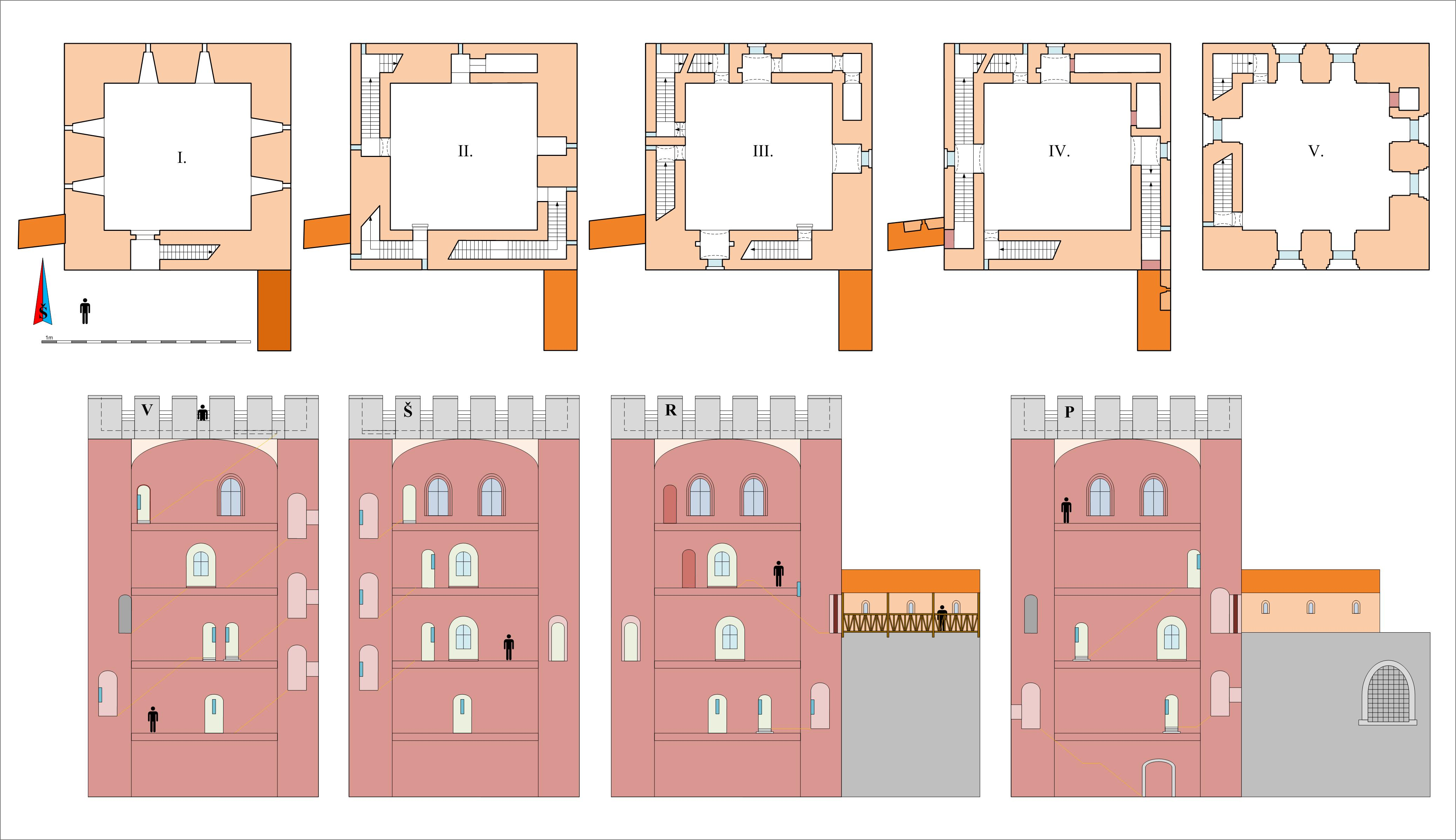 Medininkų pilies šiaurės rytinio bokšto planai ir vidinių sienų išklotinė.